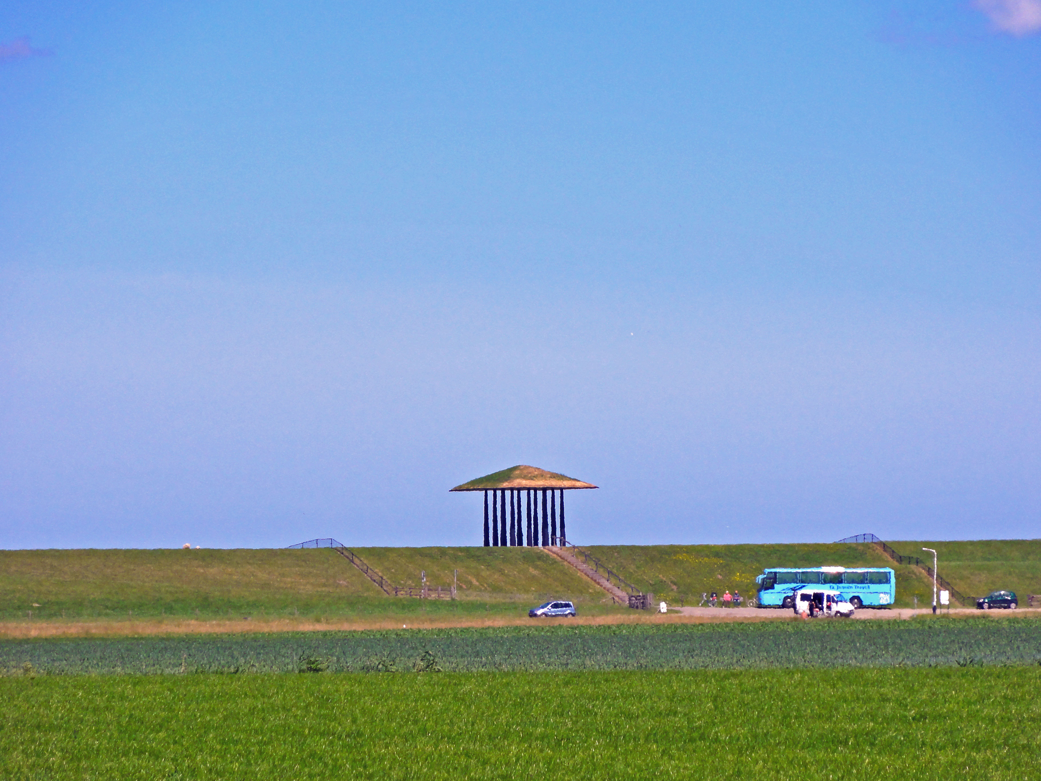 Monument ter herinnering van het op deltahoogte brengen van de Friese zeedijken; monument gemaakt door Ids Willemsma